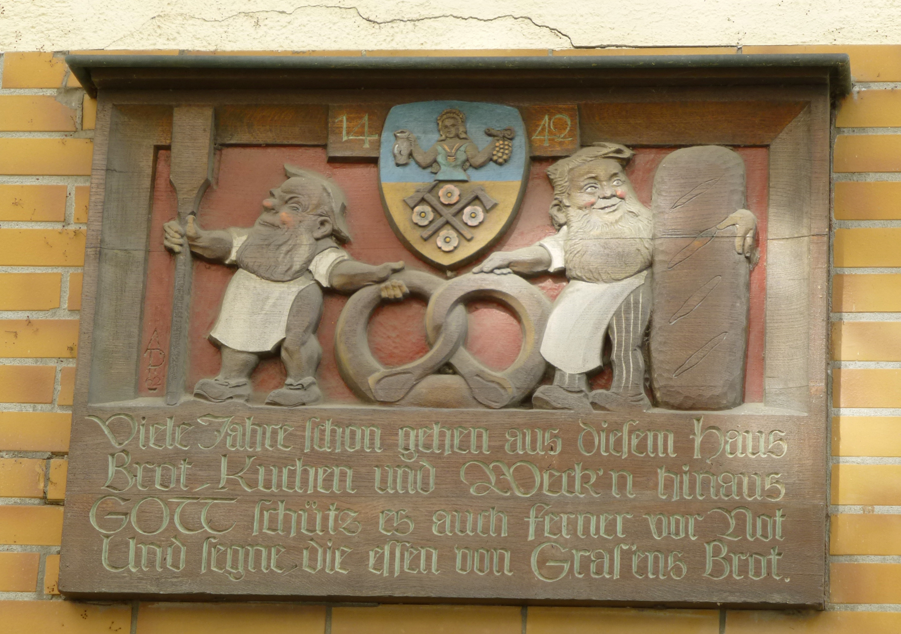 Relief historique d'un boulanger (depuis 1442!) à Braubach, Rhénanie-Palatinat.